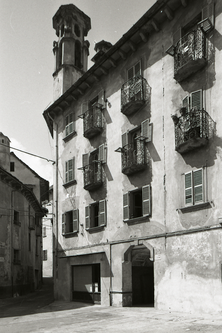 Servizio fotografico : Piedimulera, 1982 / Paolo Monti. - Strisce: 1, Fotogrammi complessivi: 5 : Negativo b/n, gelatina bromuro d'argento/ pellicola ; 35 mm. - ((Sul portanegativi: N[I]K[MA]T FP4 e iscrizione: "Piedimulera Palazzo Testoni 1-5". - Confronta scheda 3855Lpbn01-05. - Occasione: Documentazione per la pubblicazione. - Fonte: Agenda di Paolo Monti: Nikon Leika 3001-/ Monti 1978 (1978-1982), presso Archivio Paolo Monti